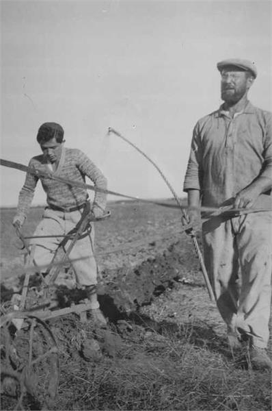 חריש בכפר אברהם בחוף יהודה